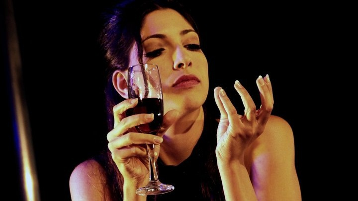 פונדק הרוחות-הפונדקית 2